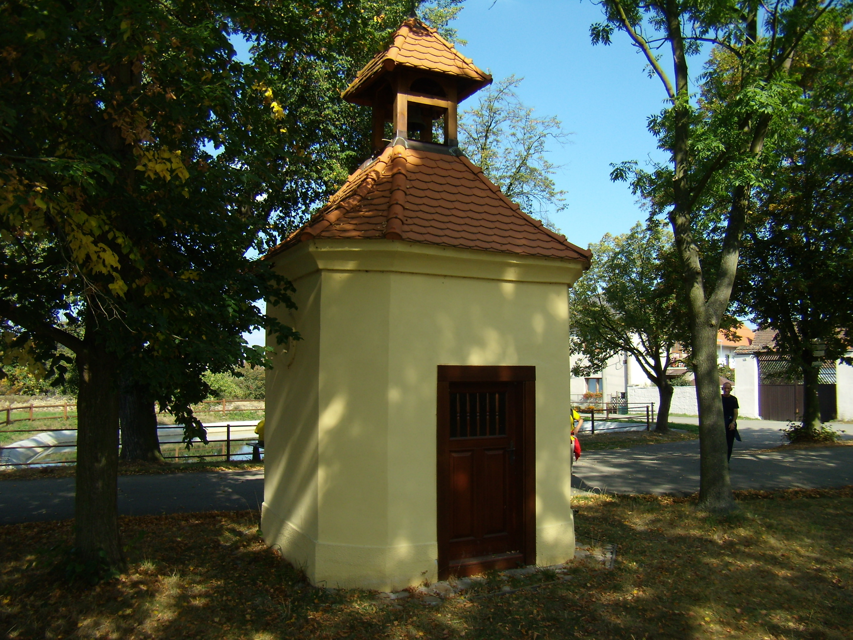 Sedlecko - kaple